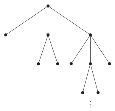 zuhaitz bertikala